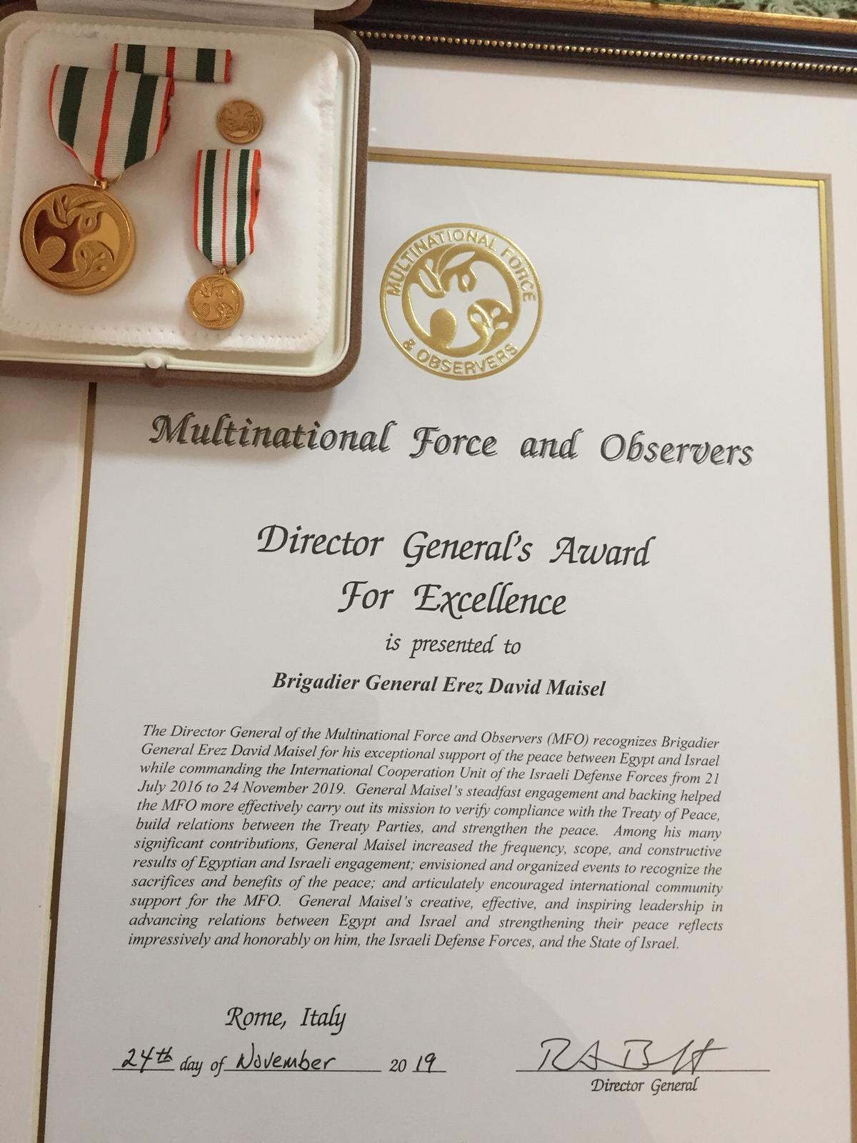 אות מטעם כוח המשקיפים הרב לאומי בסיני